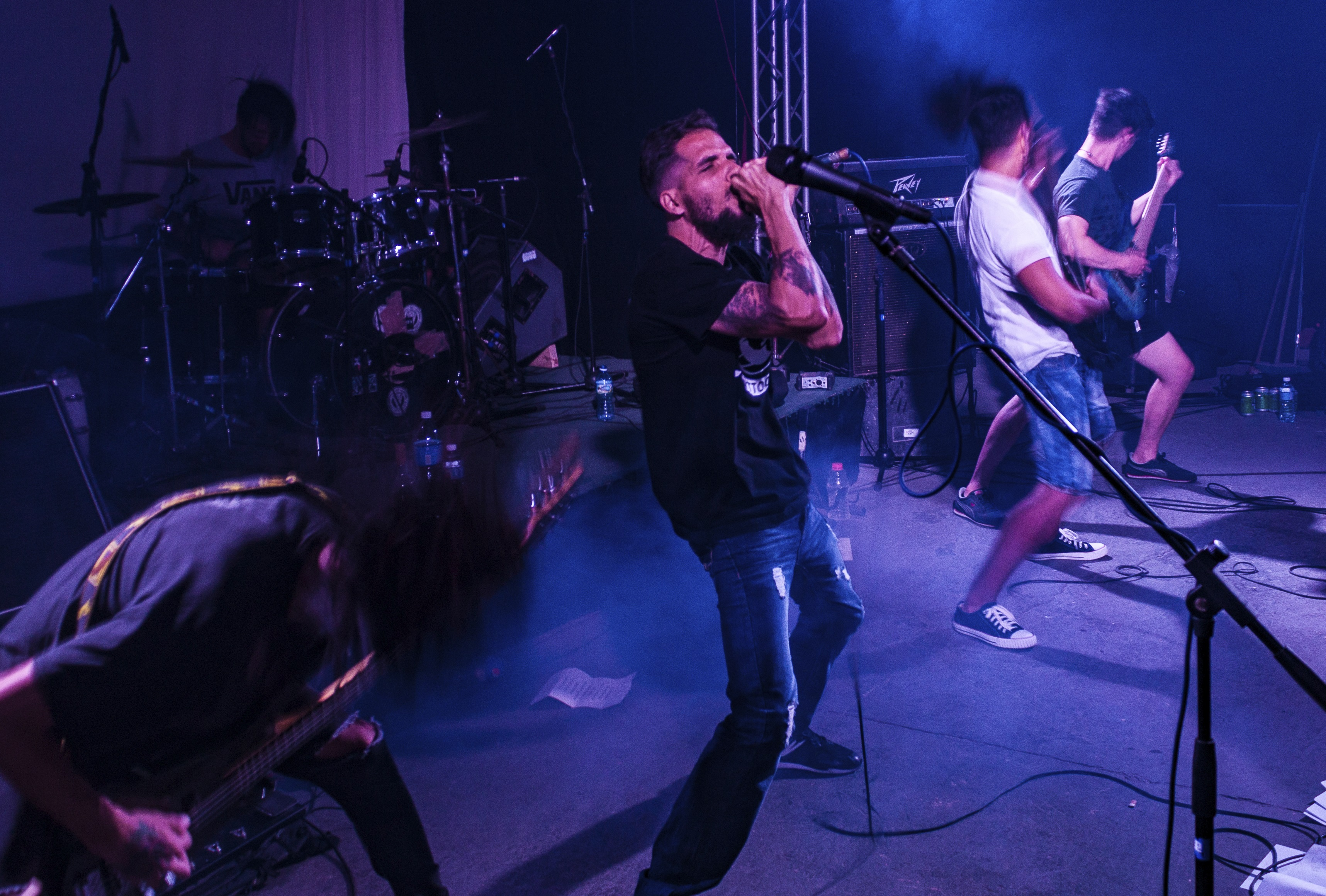 Presentación de Crampus en la sala Maxim Rock en La Habana.